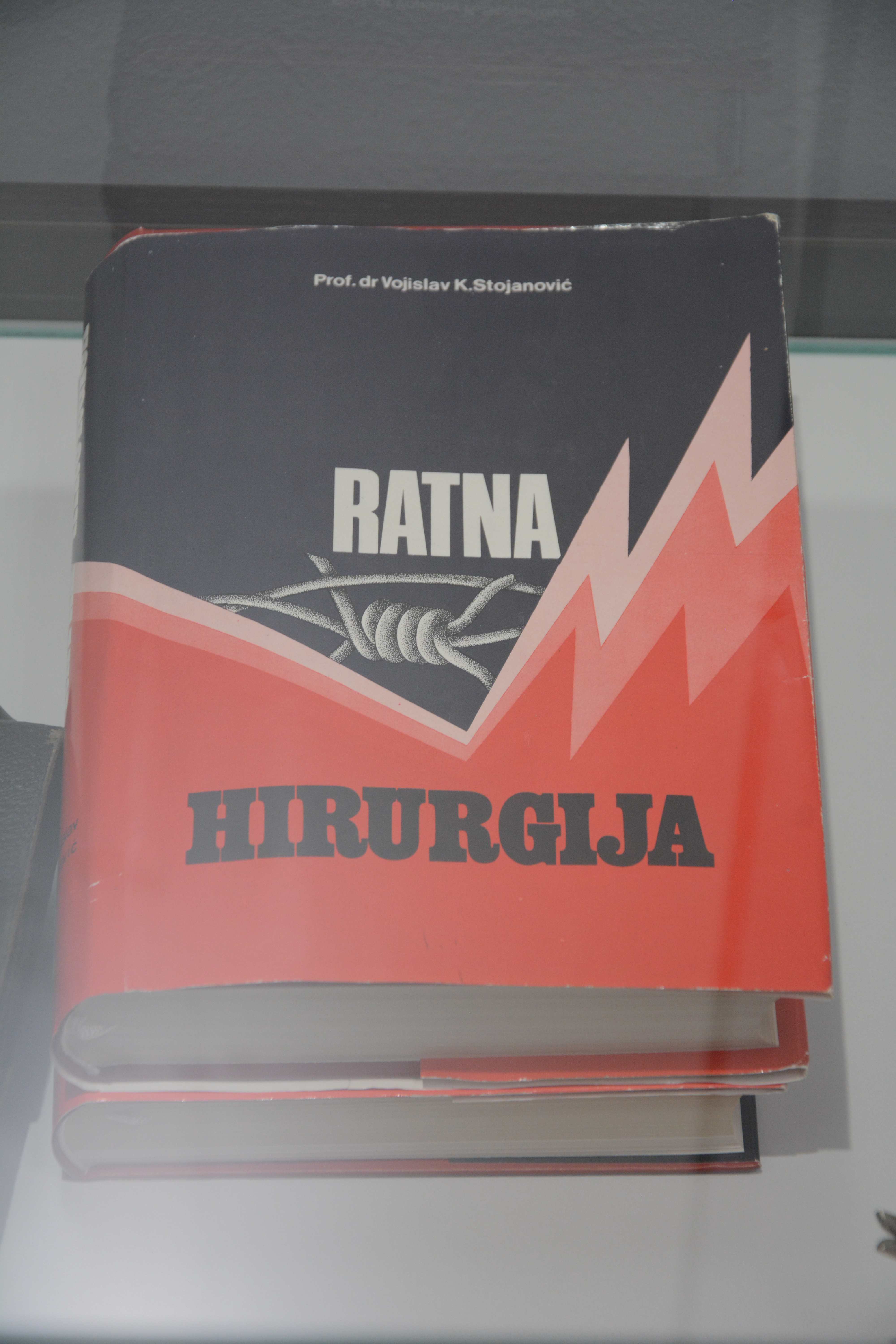 Ова датотека је донација Народног музеја Топлице, у оквиру програма стажирања реализованог од стране Викимедије Србије. This file is donated by the National museum of Toplice, as part of the Wikipedian in Residence program implemented by Wikimedia Serbia.